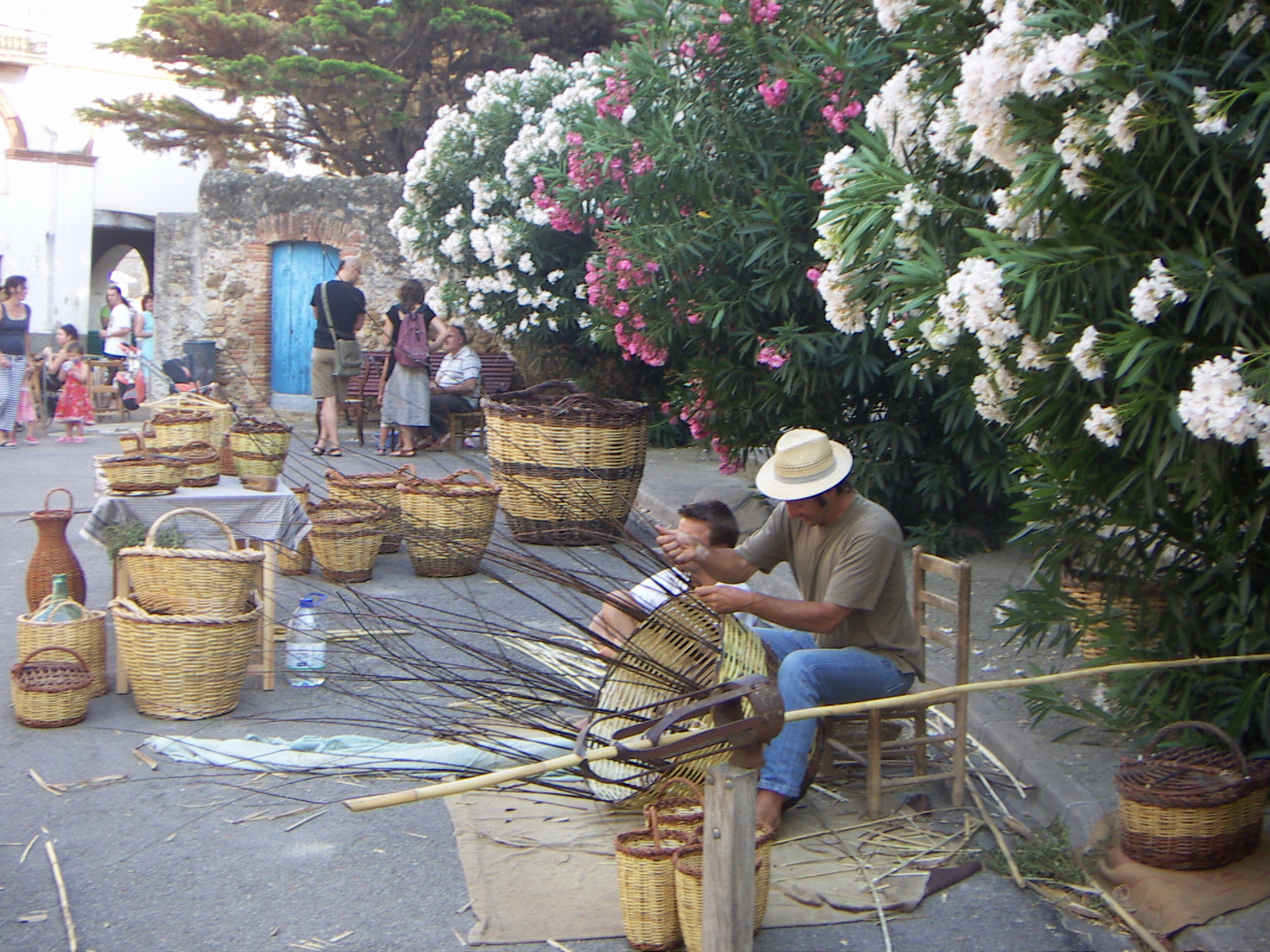 Plaça de l'esglèsia de Cabanes. (Fira de la Canya) 13 de març de 2007 Jo mateix, Jordi Coll Costa